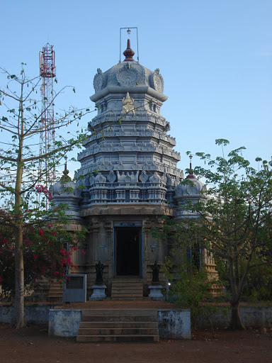 காரைக்குடியில் அமைந்துள்ள தமிழ்த்தாய் திருக்கோயில்